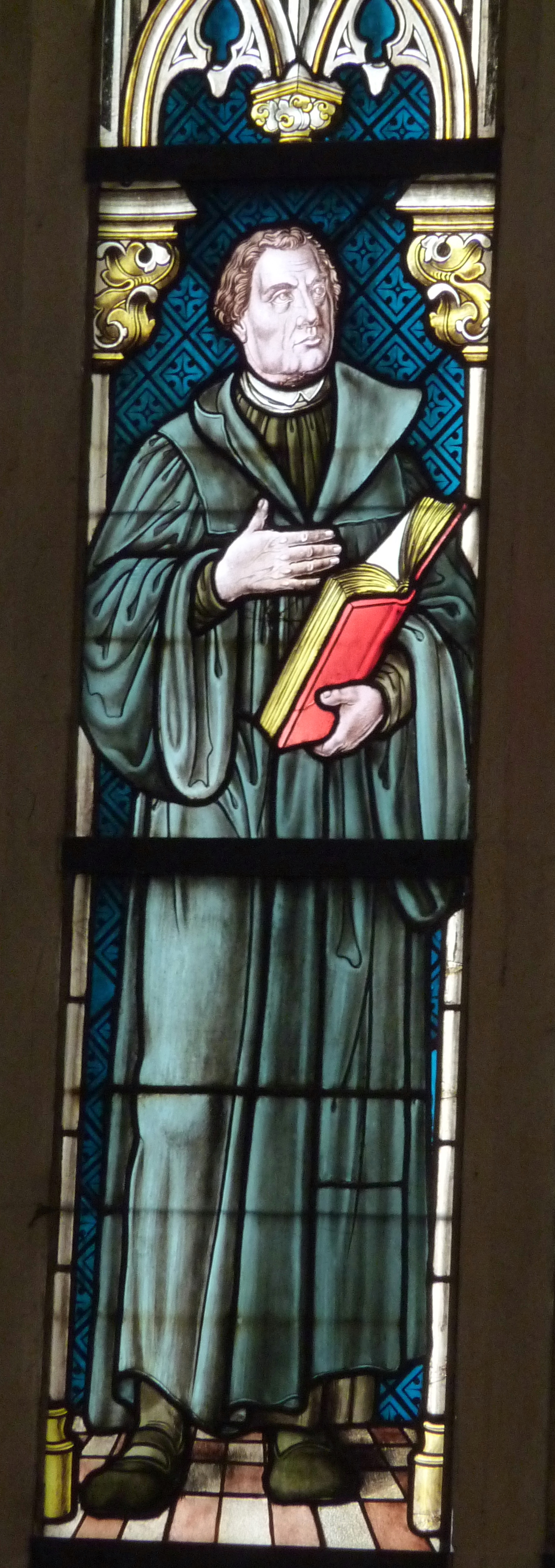 Bleiglasfenster in der Evangelischen Marktkirche St. Dionys in Eschwege im Werra-Meißner-Kreis (Hessen), von 1894-1901; Signatur: K. J. Schultz/Marburg; Darstellung: Martin Luther, Philipp I. von Hessen, Philipp Melanchthon (Ausschnitt: Martin Luther)